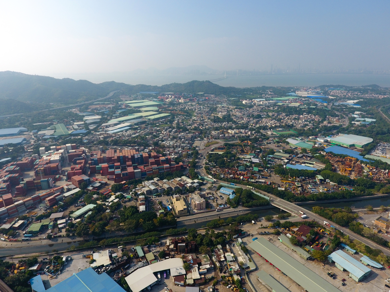 Ha Tsuen